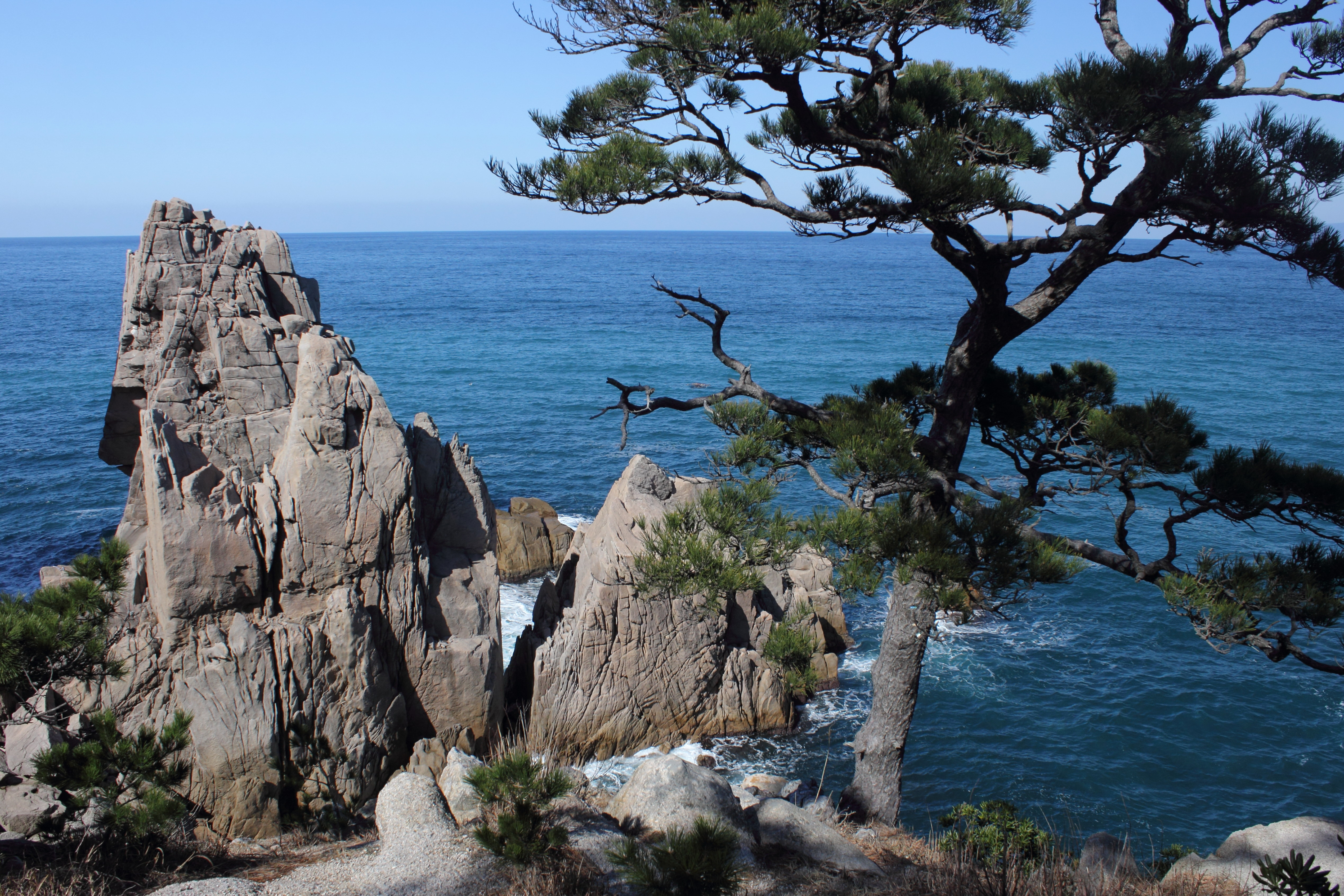 白木門ヶ崎